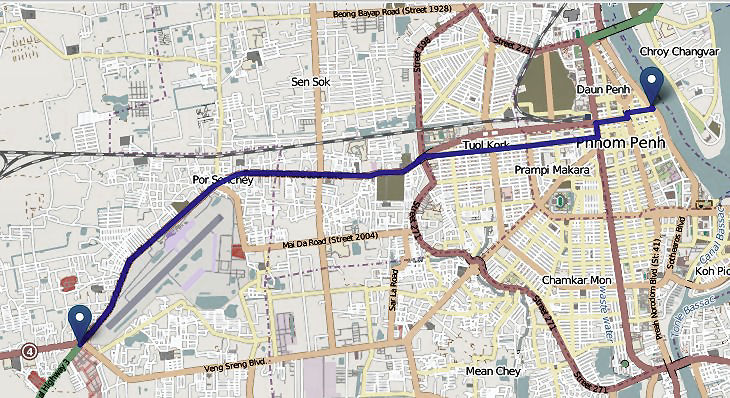 Buslinie 03 (OpenStreetMap)